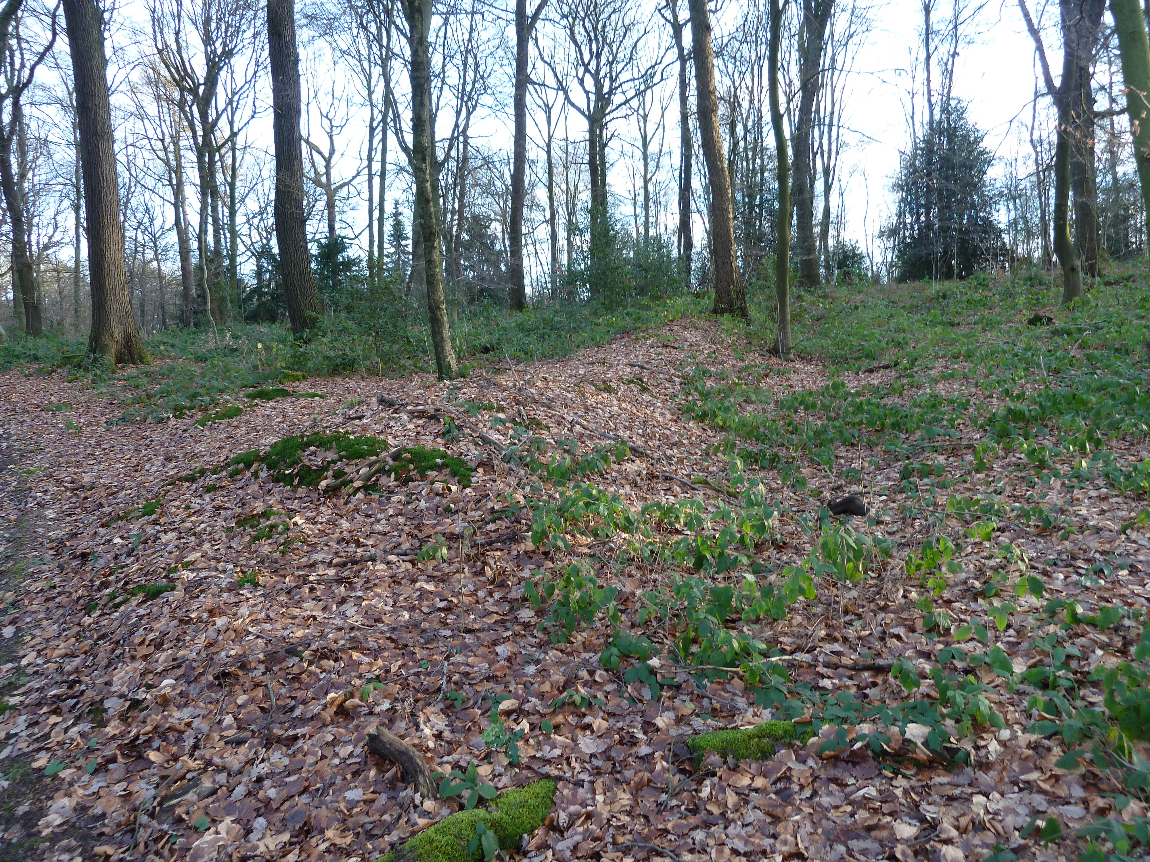 Wuppertal - Barmer Landwehr